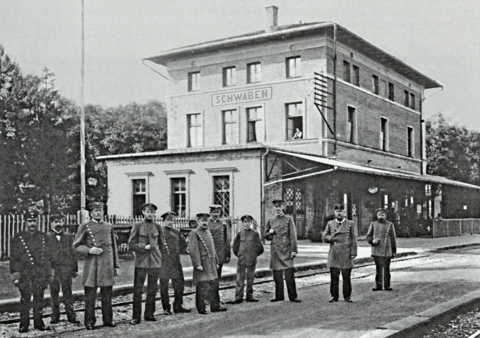 Empfangsgebäude des Bahnhofs Schwaben von der Gleisseite mit versammeltem Stationspersonal. Der Ostflügel wurde gerade neu errichtet.